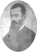 Foto de Albino Meira